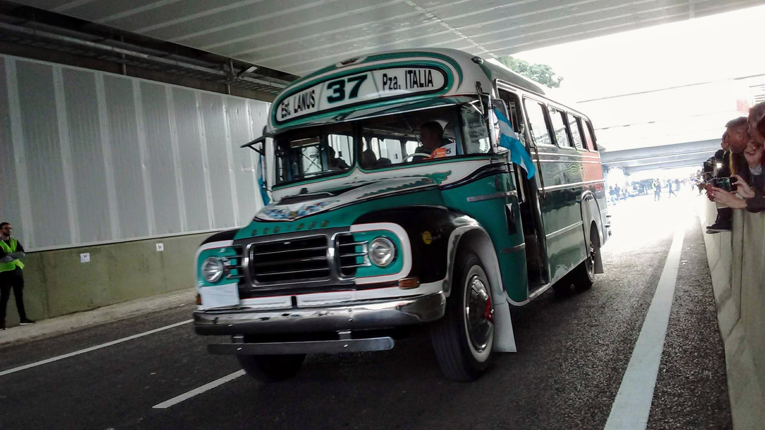 Inauguración del Paseo del Bajo Desfile de vehículos antiguos